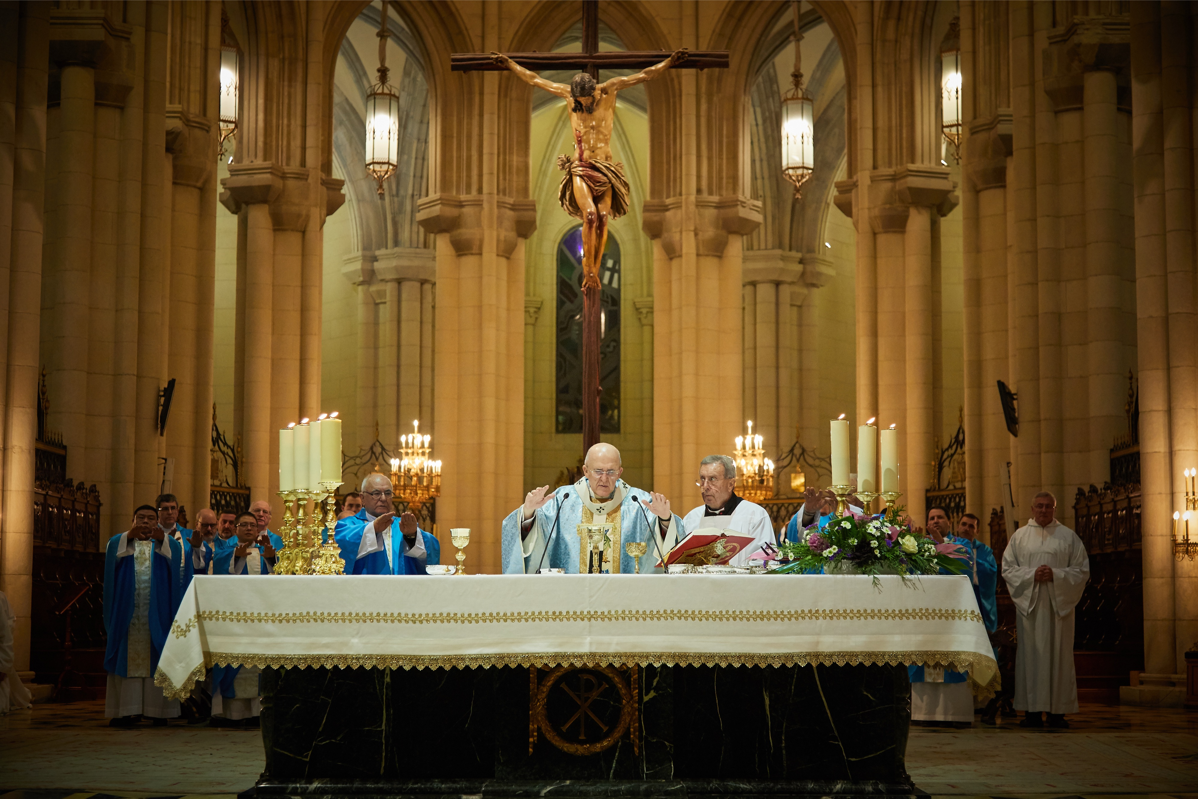 7 de diciembre de 2017 - Vigilia de la Inmaculada 2018 Vigilia de la Inmaculada en la catedral de Santa María la Real de la Almudena. Cardenal D. Carlos Osoro Sierra. Arzobispo de Madrid. Créditos: archimadrid / Ignacio Arregui García